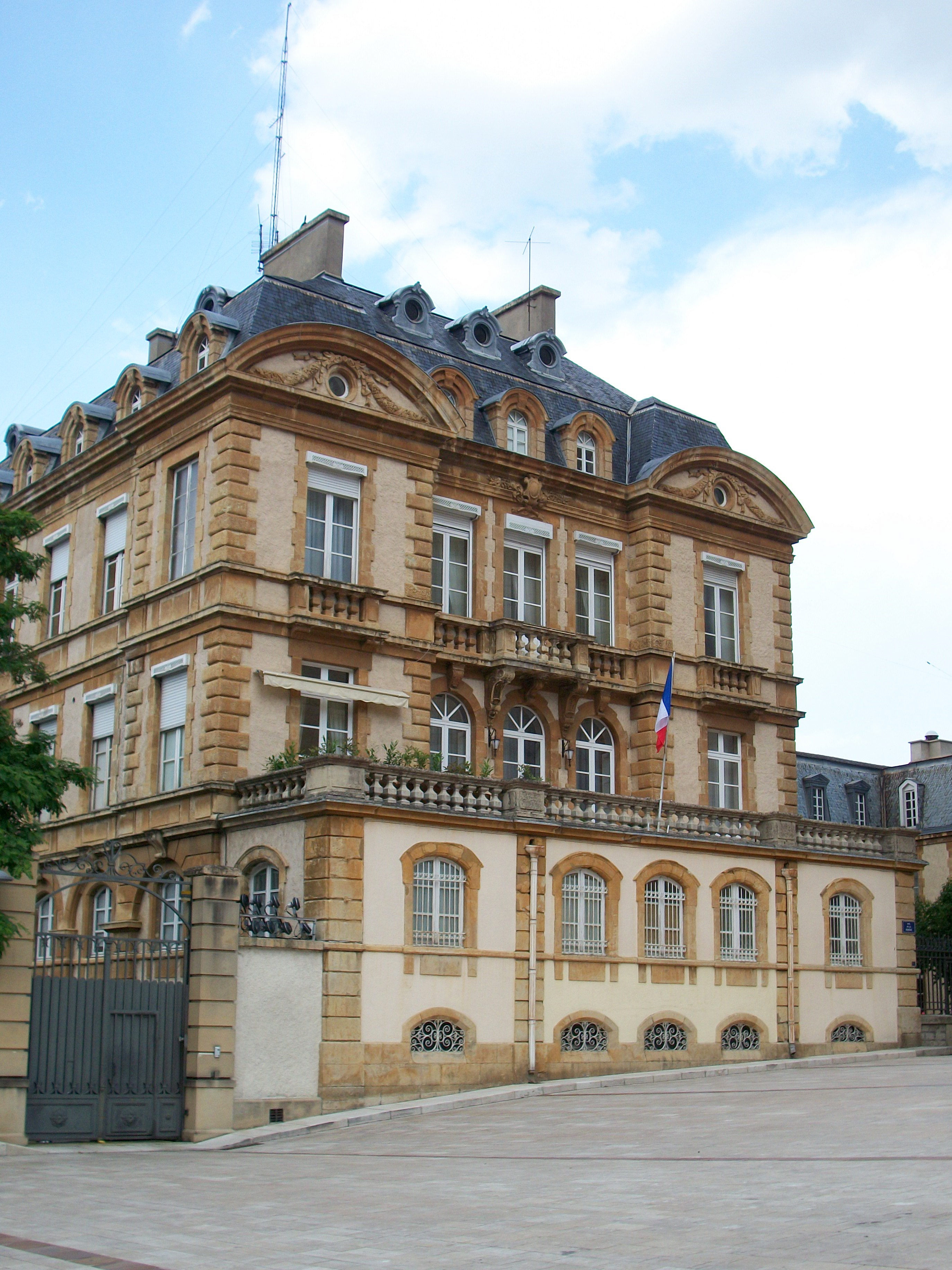 Ancien palais épiscopal devenu préfecture et siège du Conseil Général de Lozère à Mende, France